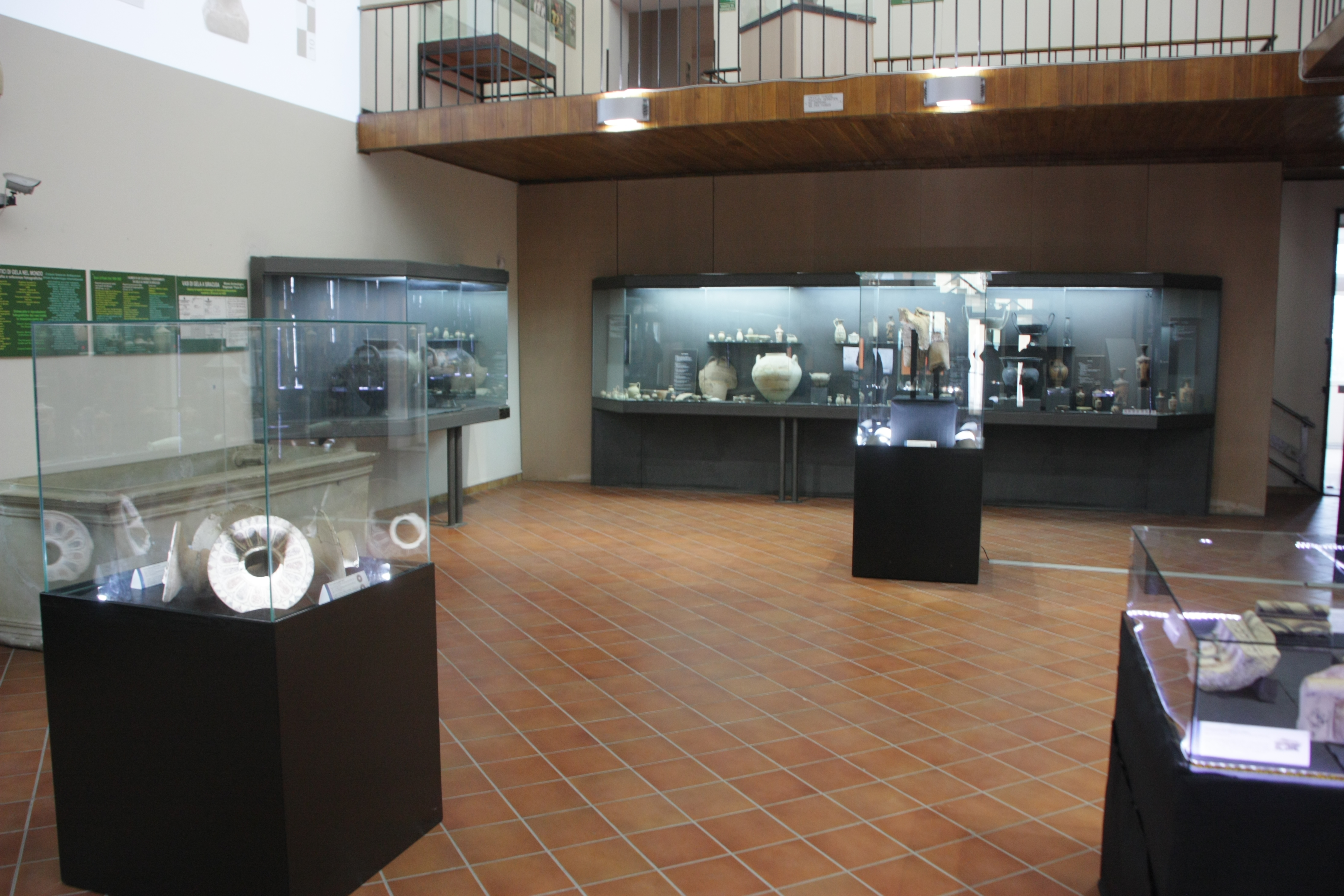 Sala del Museo di Gela